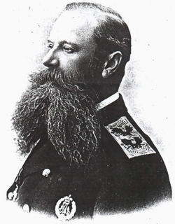 Stepan Osipovich Makarov (Степан Осипович Макаров), Russian Admiral (b.1849-d.1904)